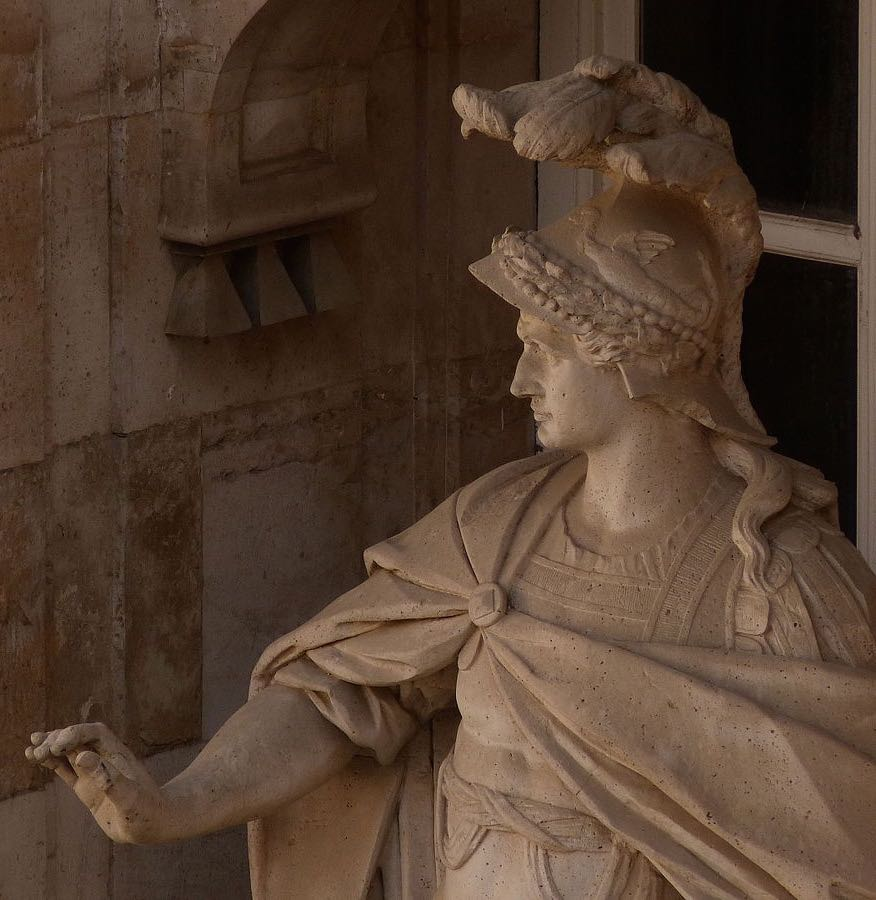 Palacio Real de Madrid, detalle de estatua del emperador Honorio en el Patio del Príncipe.